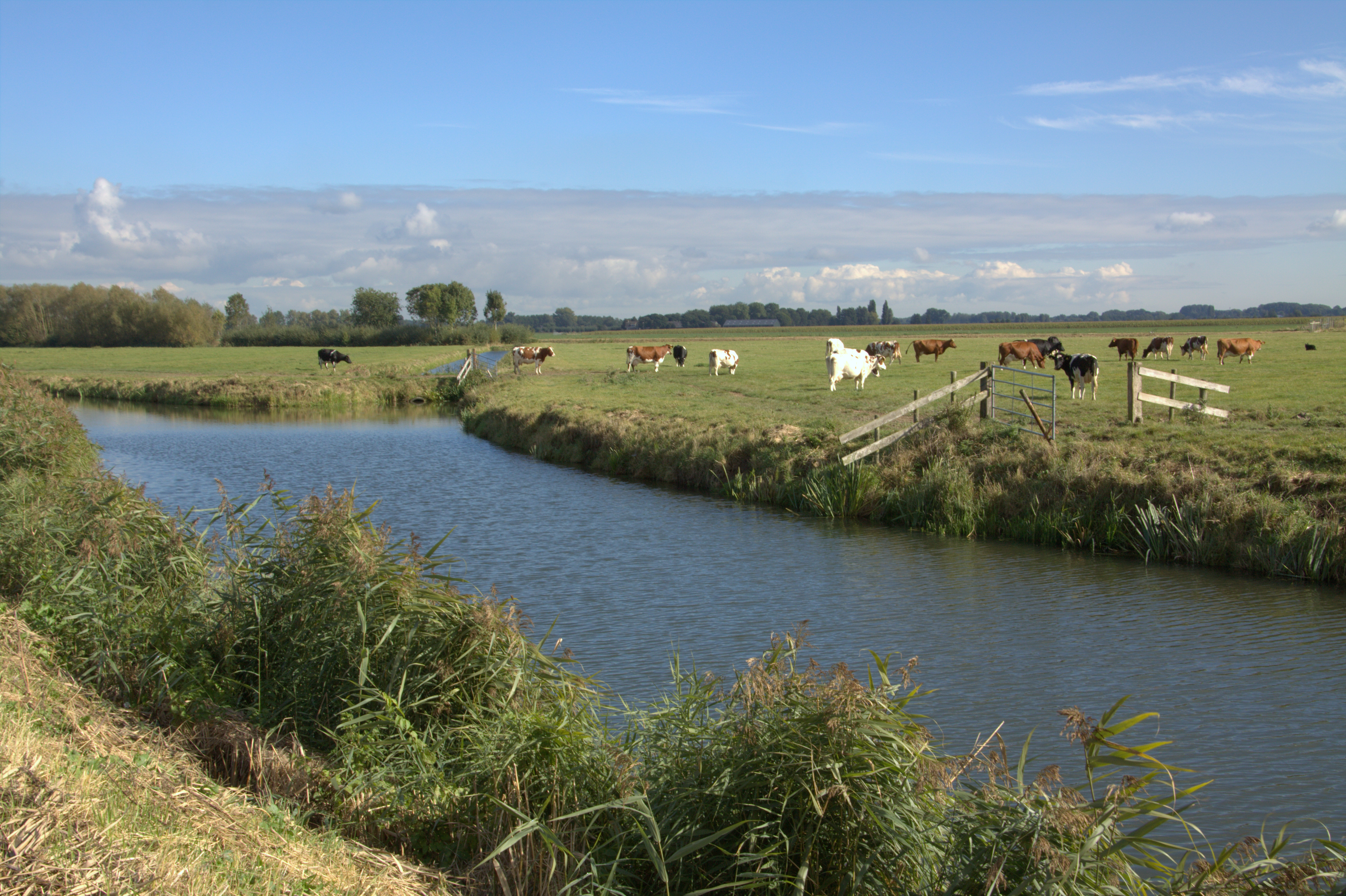 Een blik over de Achterwetering vanaf de Sluisweg en over de Polder Rietveld bij Arkel.